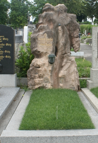 Friedhof Döbling-Ludwig Speidel